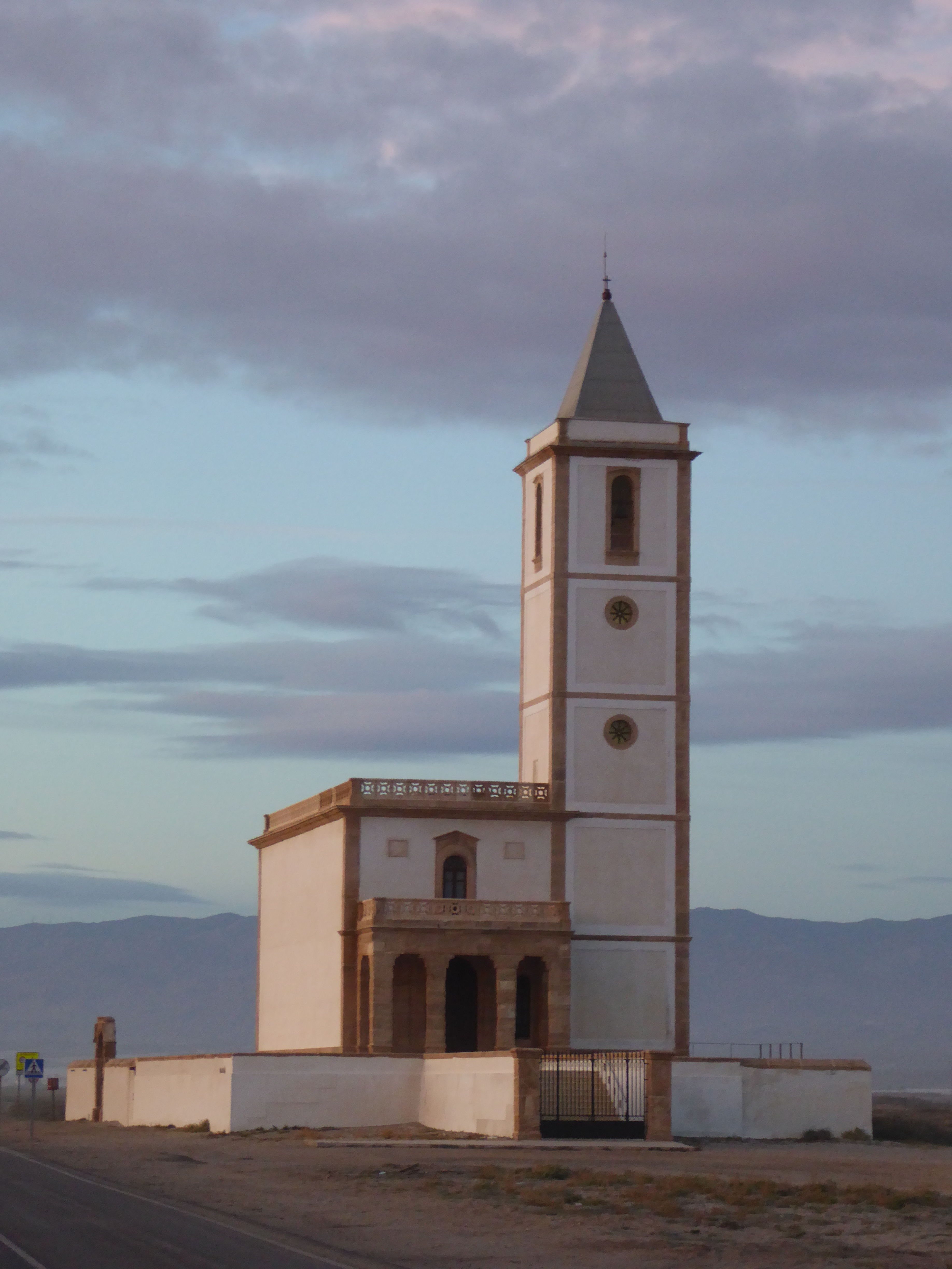 Iglesia de las Salinas. Cabo de Gata - Níjar This is a photography of a Special Area of Conservation in Spain with the ID: ES0000046. Natura2000 entry, EEA entry